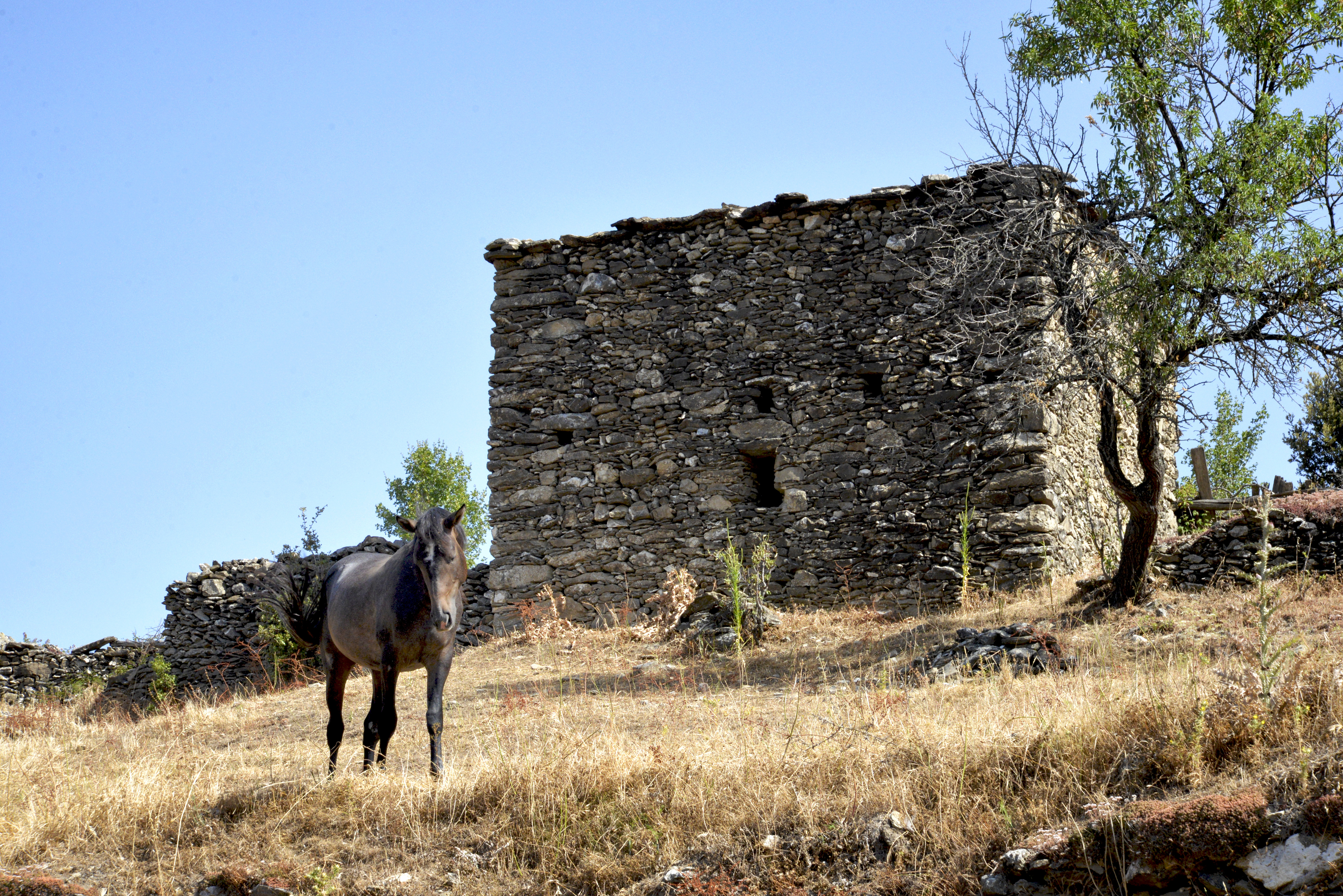 Tralonca, Centre Corse (Haute-Corse) - Ancienne remise agricole parmi d'autres qui sont à l'état d'abandon à l'entrée ouest du village.